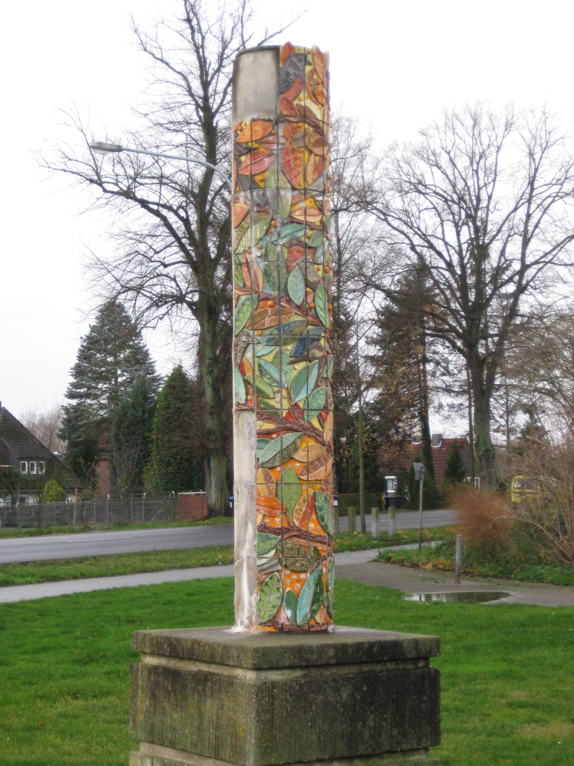 Stele "Keramikvögel" von Alfred Klosowski in Lübeck, 1994, Zustand November 2008, Blickrichtung vom Hudekamp